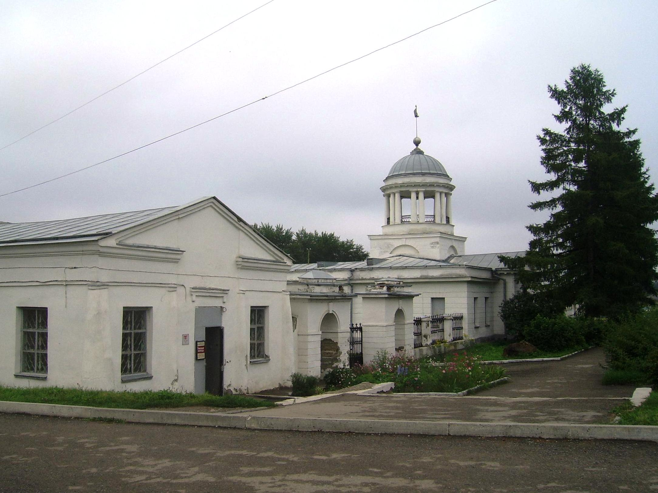 Gostiny Dvor van het Malachhovcomplex in Kamensk-Oeralski schuin van voren gezien. Het Malachovcomplex vormt het historische hart van de stad en is opgetrokken in classicistische stijl. In de Gostiny Dvor bevindt zich nu het streekmuseum van de stad